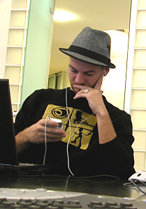 alessandro cattelan chatta